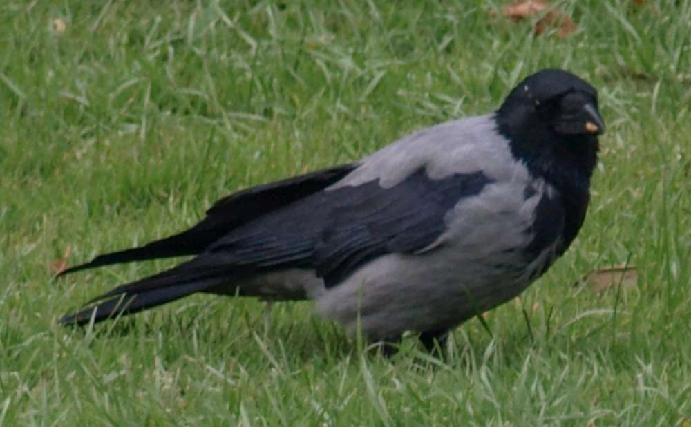 Dolmányos varjú, szürkevarjú (Corvus cornix) (Budapest, Margitsziget)